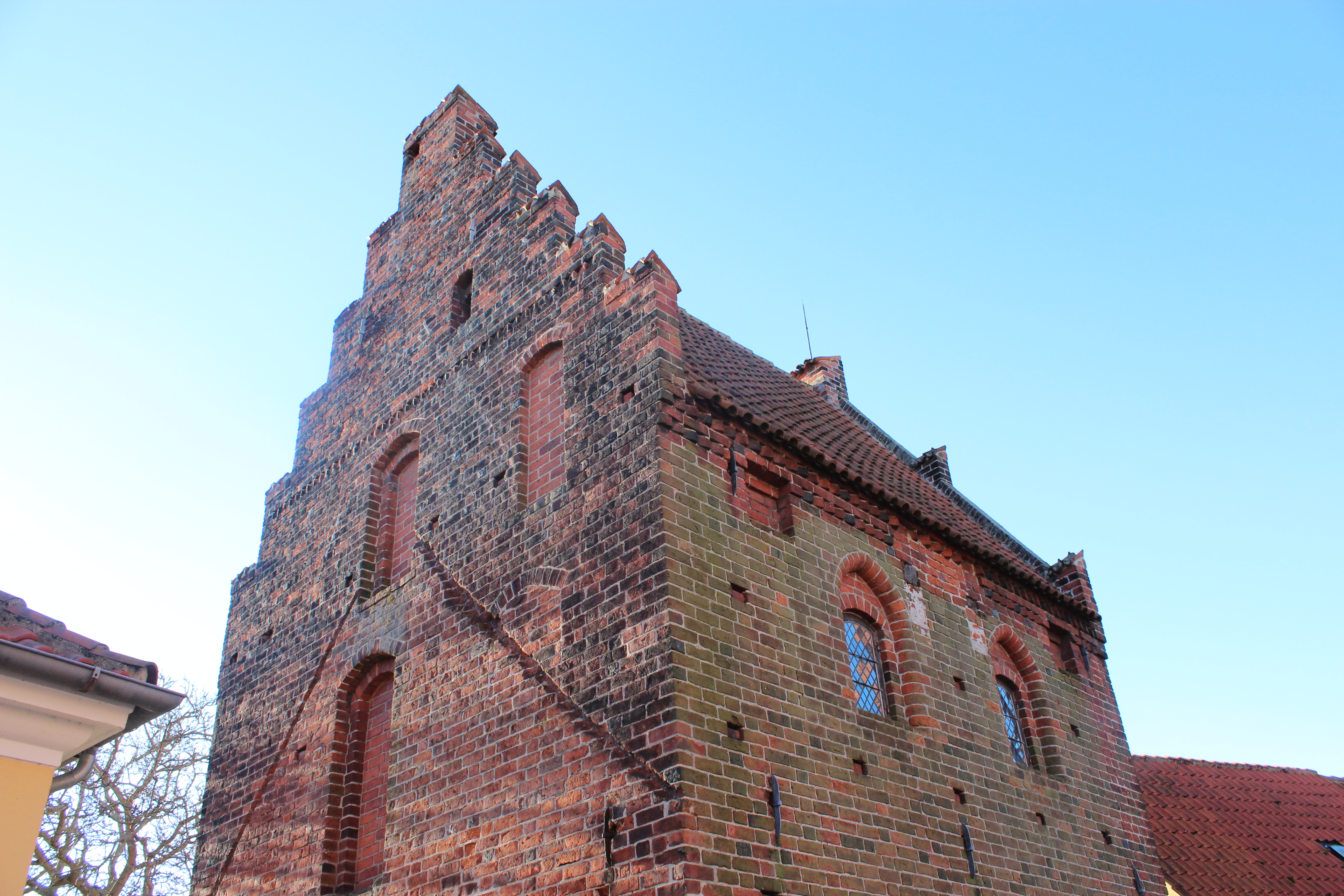 Østgavlen af Præstegadehuset med tilmuerede døråbninger, der har ført til et nu nedrevet bindingsværksbygning.